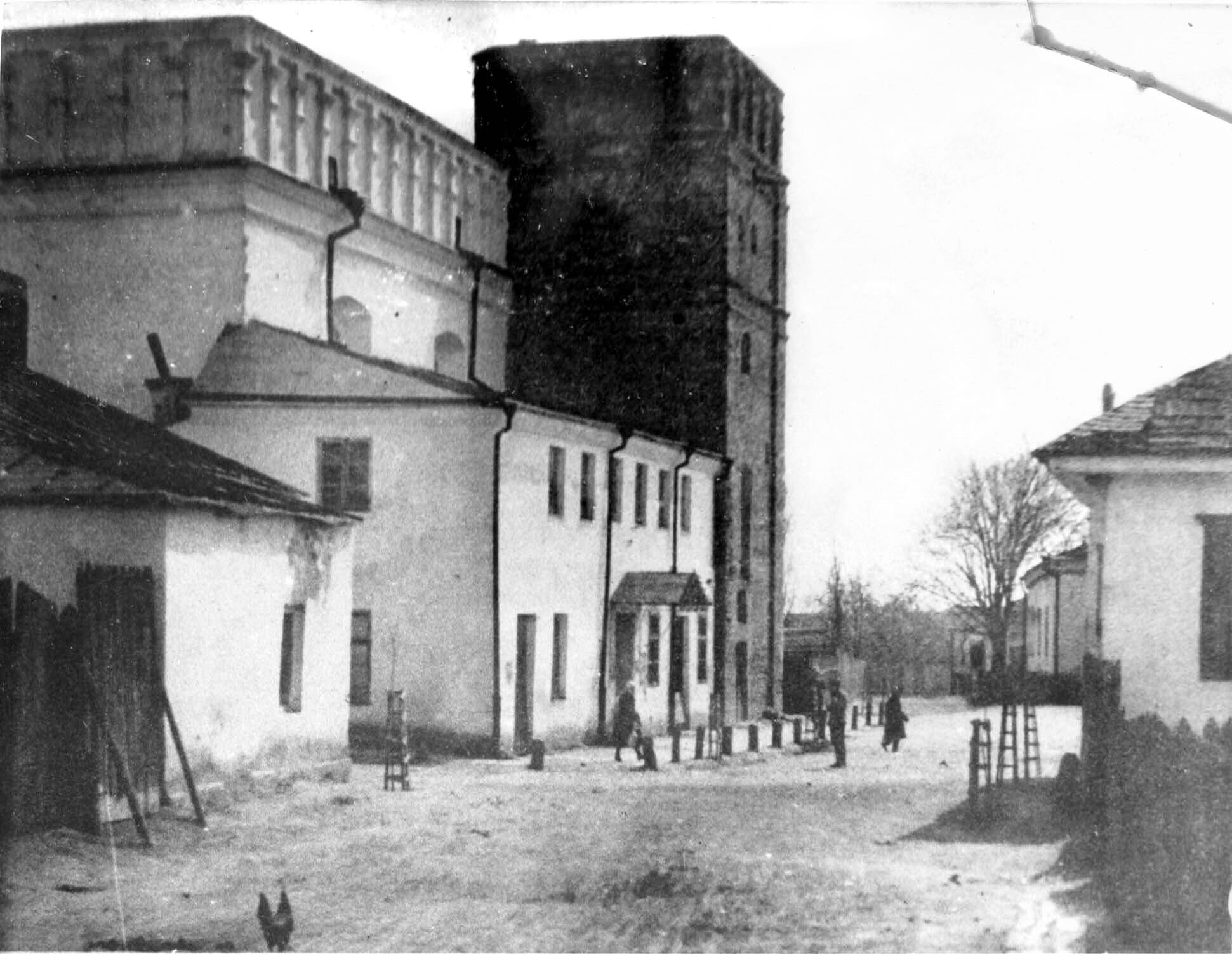 Большая синагога в Луцке в начале XX в.